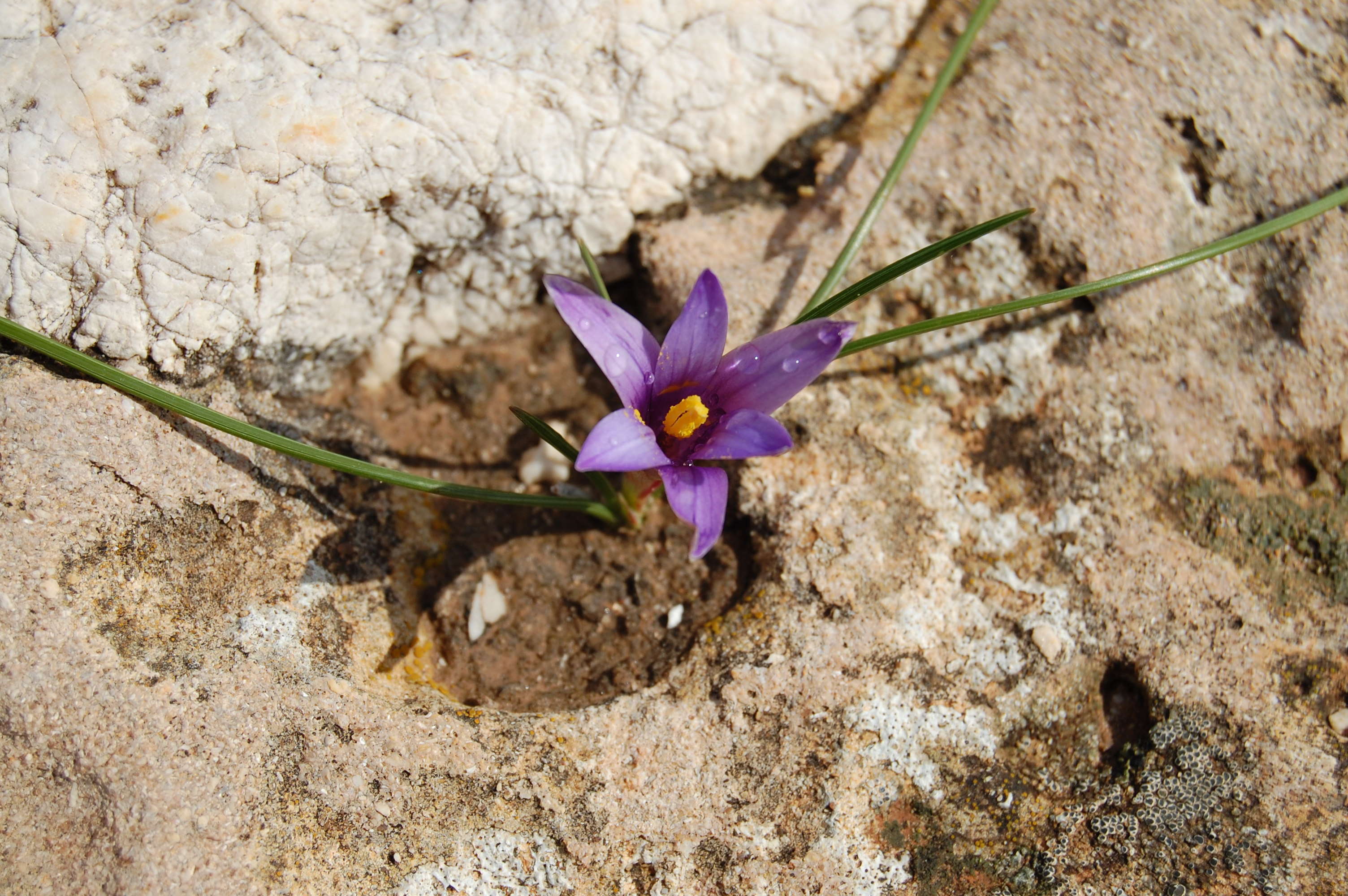 Romulea linaresii Parl. Riserva naturale Monte Cofano, Sicily